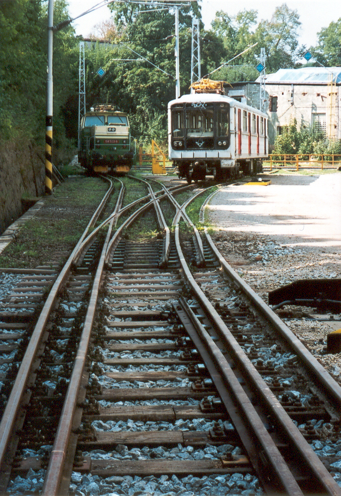 Kolejová splítka rozchodů 1000, 1435 a 1520 mm v plzeňské Škodovce.